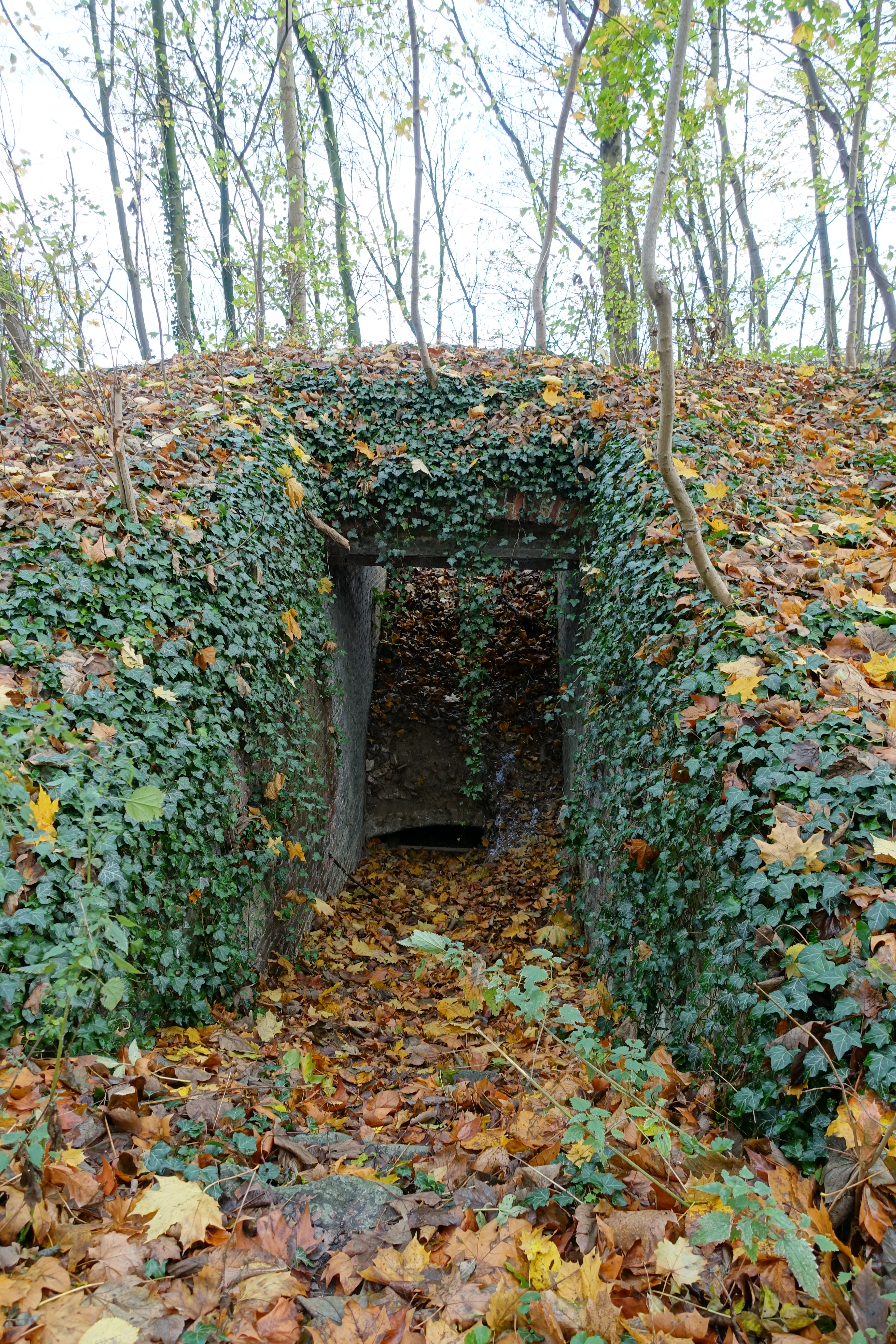 Middelste ijskelder in Domein Drie Fonteinen